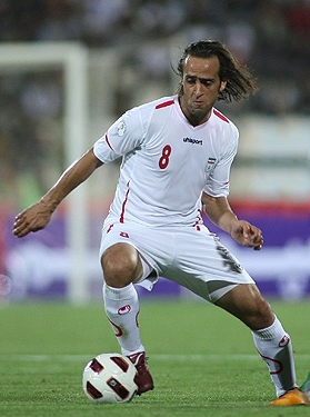 علی کریمی در بازی با اندونزی - ایران ۳ - اندونزی ۰ - شهریور ۱۳۹۰